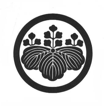 丸に五三桐